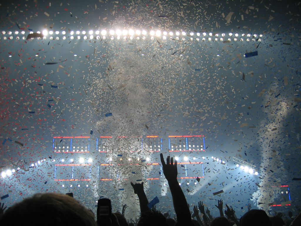 Rammstein performing 'Amerika' in Nottingham.